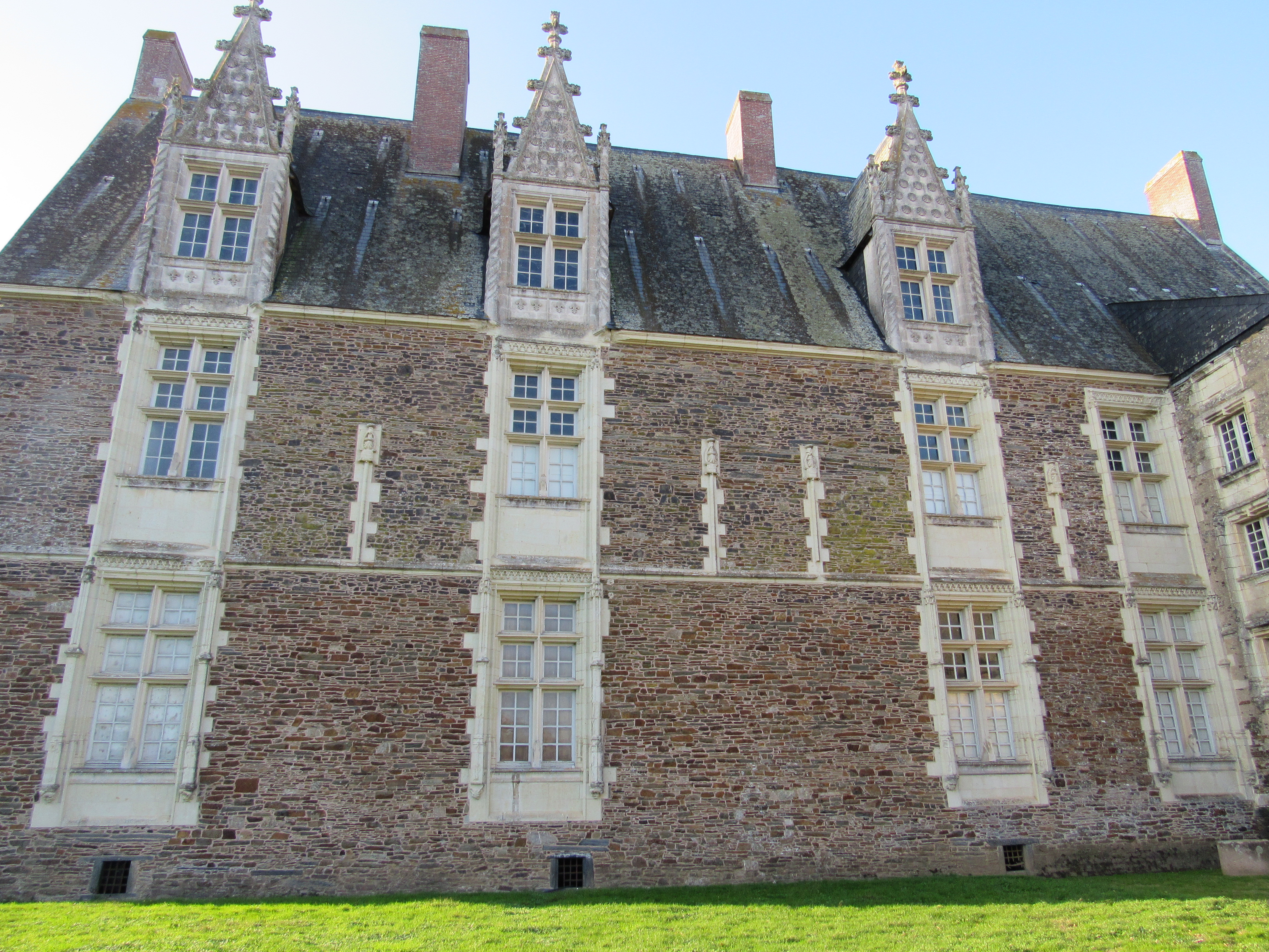 Façade sur cour du logis de la Motte-Glain, Loire-Atlantique, France.